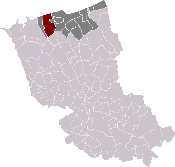 Locatie gemeente Groot-Sinten in arrondissement Duinkerke. Zelfgemaakt. Location of Grande-Synthe municipality in the arrondissement of Dunkirk. Self made. Localisation de la commune de Grande-Synthe dans l'arrondissement de Dunkerque. Fait moi-même.